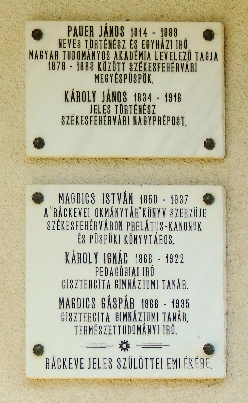 A város jeles szülötteinek emléktáblája. - Pest megye, Ráckeve, Óváros, Szent István tér 20